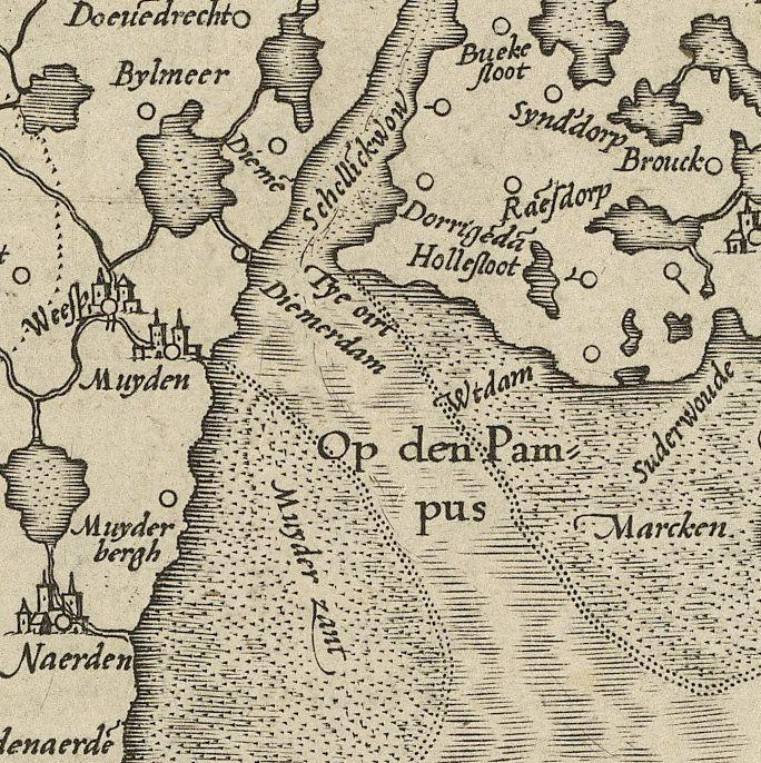 Kaart van Holland en Utrecht. Op de achterzijde staat Franse tekst, hetgeen er op wijst dat de kaart afkomstig is uit een Franse editie van de Mercator-Hondius Atlas. Deze atlas werd oorspronkelijk door Gerard Mercator samengesteld en uitgegeven te Duisburg in 1585; naderhand werd de uitgave door Hondius te Amsterdam voortgezet. Franse edities van die atlas verschenen onder andere in 1609, 1613, 1619 en 1628. De grote Noord-Hollandse meren zijn nog niet ingepolderd, zodat het kaartbeeld van voor 1612 moet zijn.